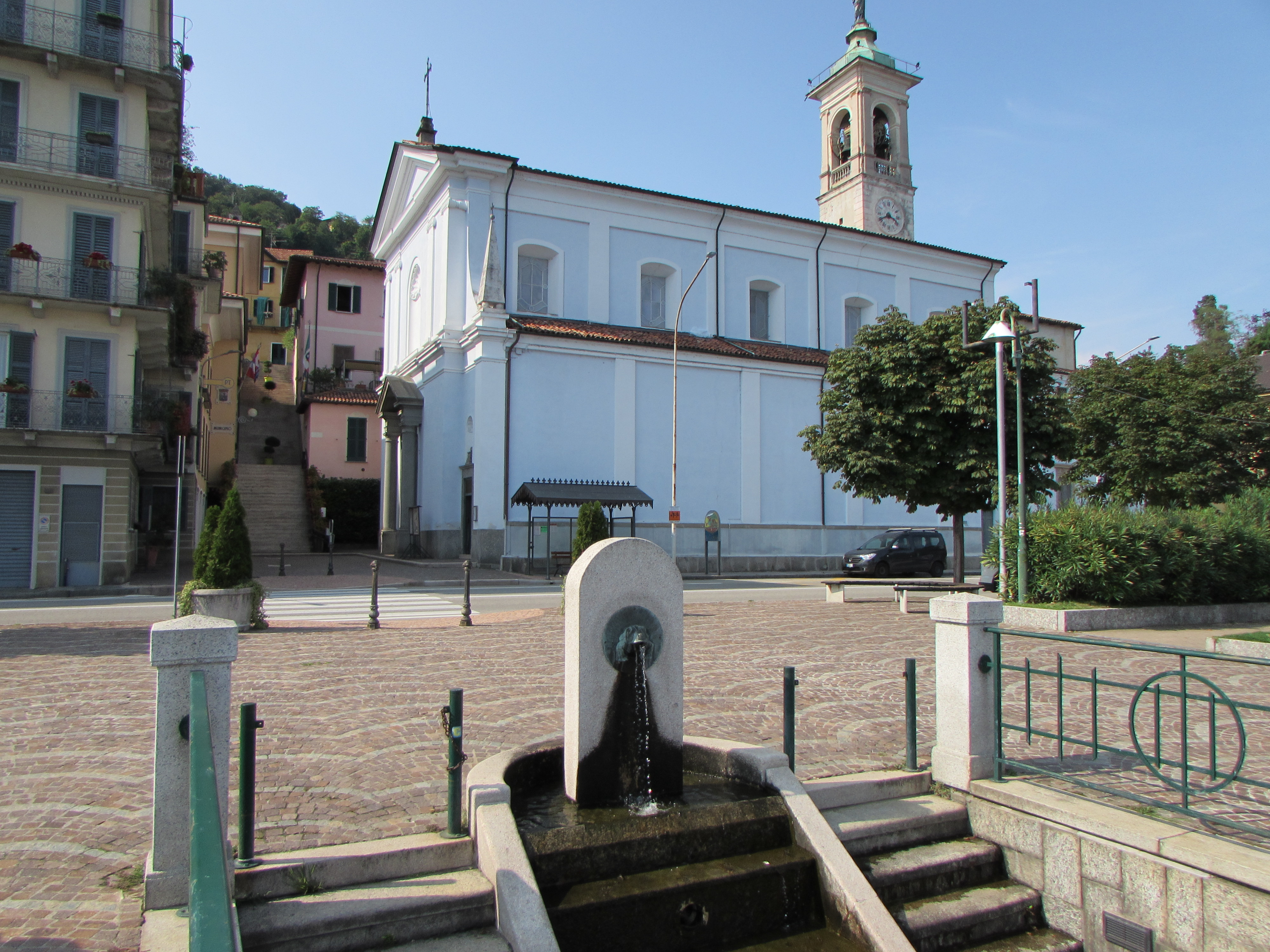 Veduta Chiesa Parrocchiale